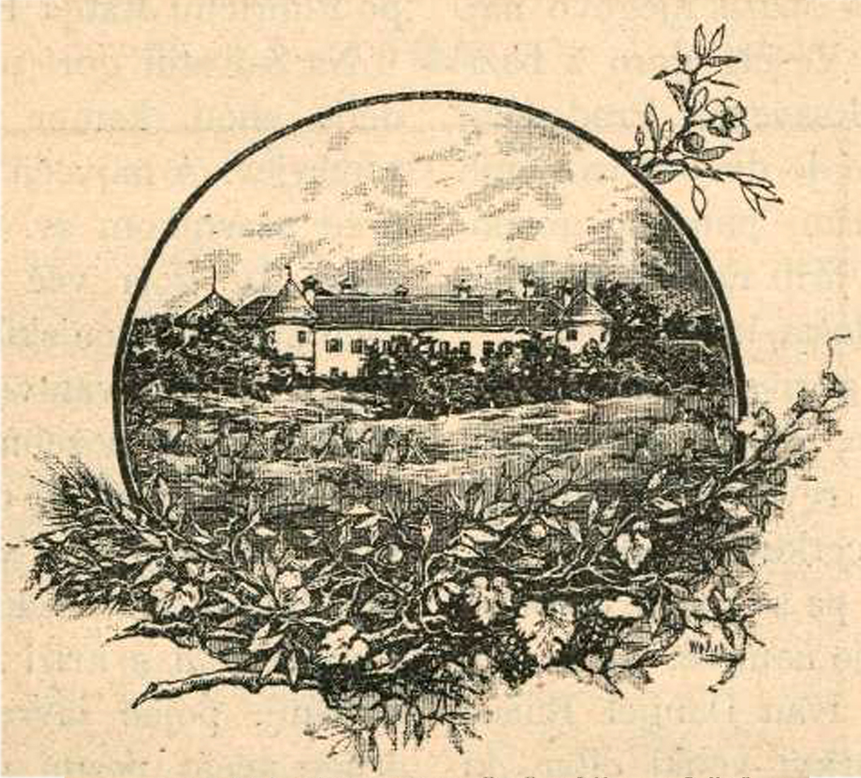 Dom in svet 01.08.1893